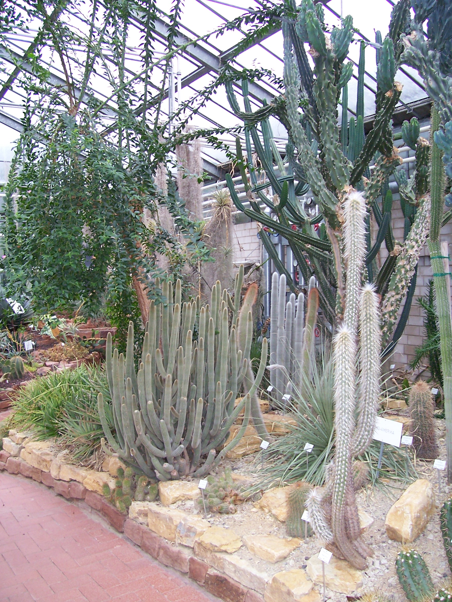 Neuer Botanischer Garten Marburg, Schaugewächshäuser, Sukkulentenhaus